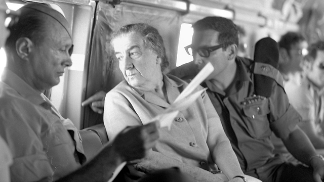 ראש הממשלה גולדה מאיר, האלוף רחבעם זאבי ושר הביטחון משה דיין בטיסה במסוק צבאי במלחמת יום כיפור.